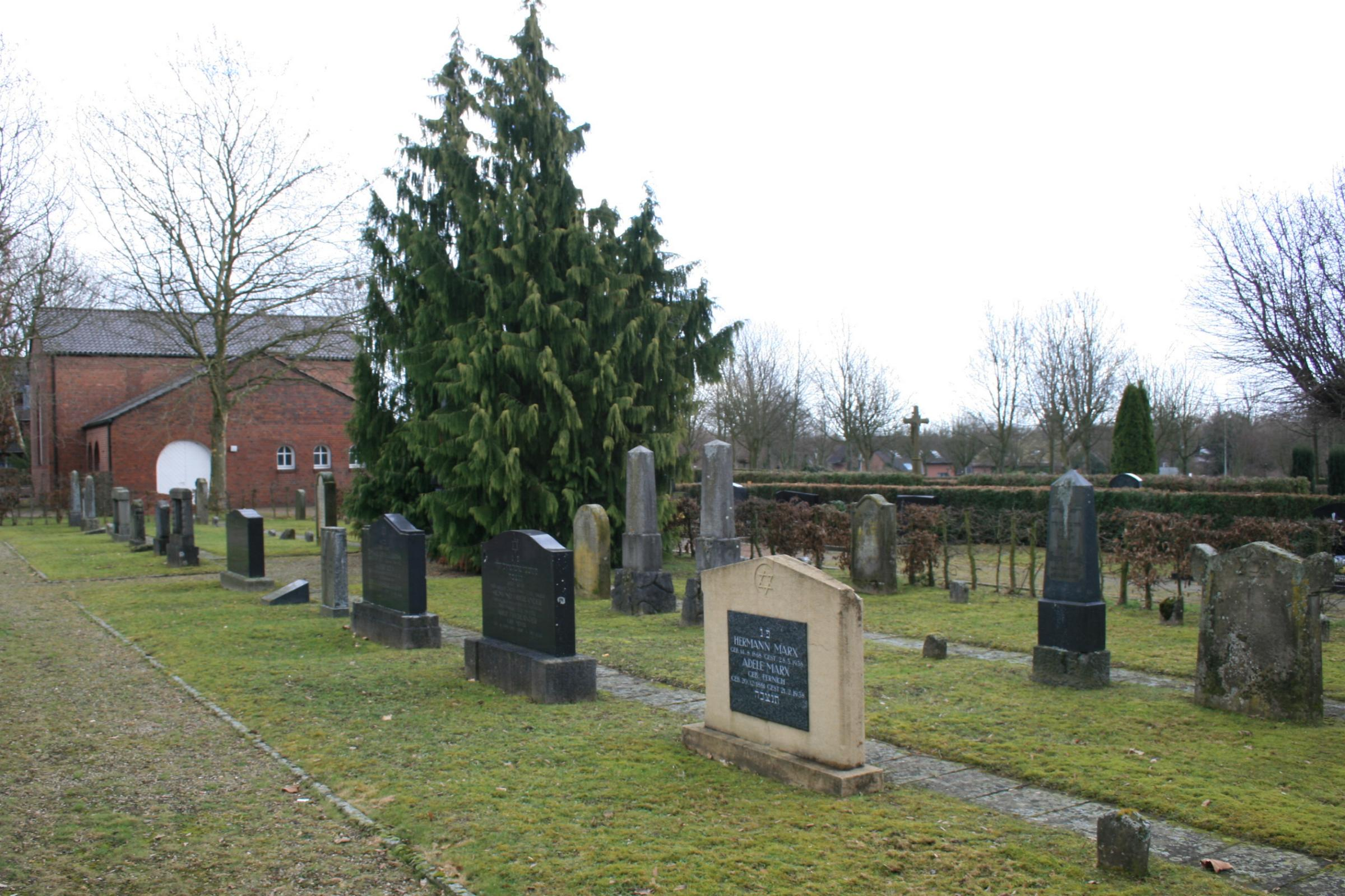 Baudenkmal in der Gemeinde Jüchen Nr. 170